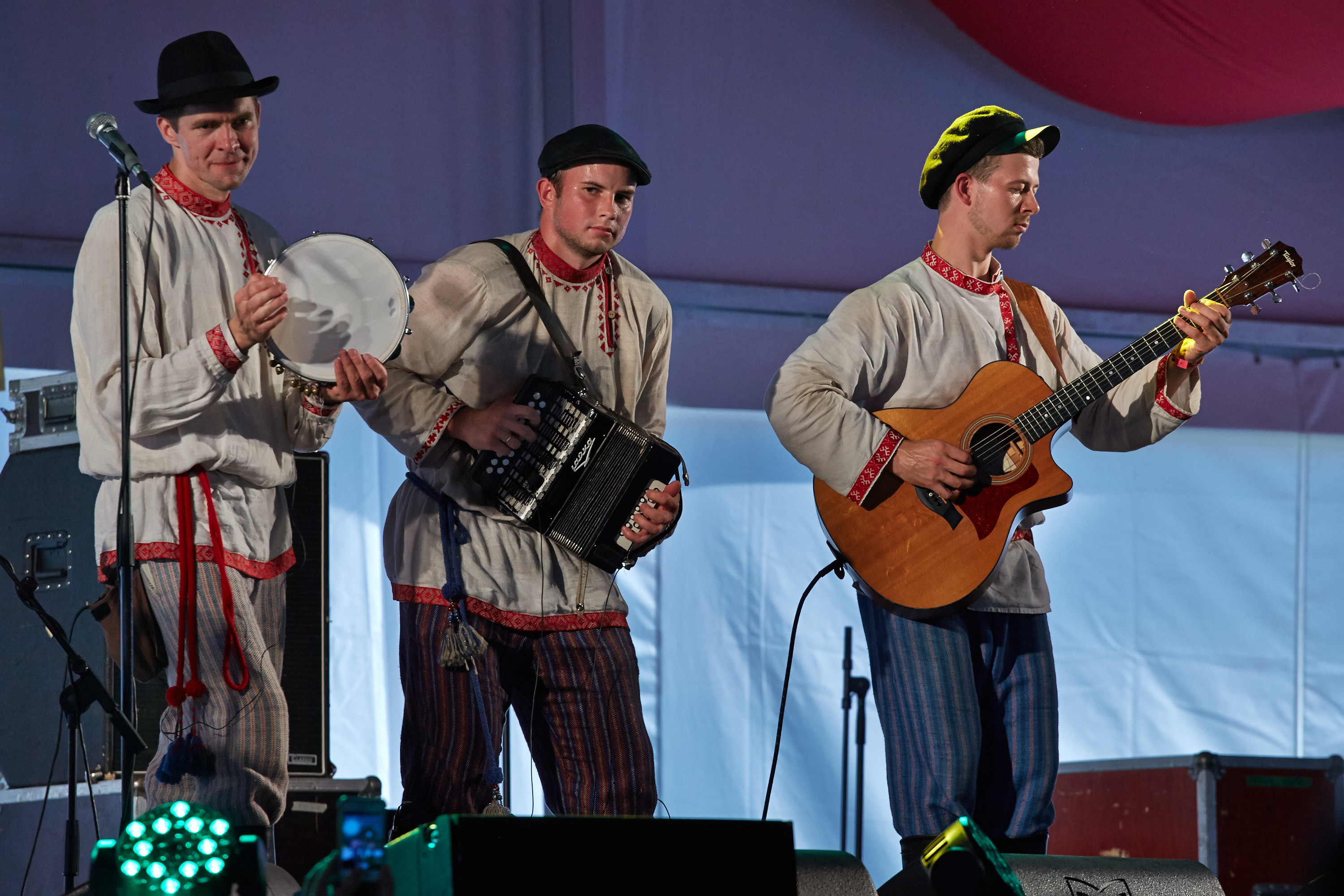 Ansambel Klapp 2013. aasta juulis Viljandi folgil esinemas.